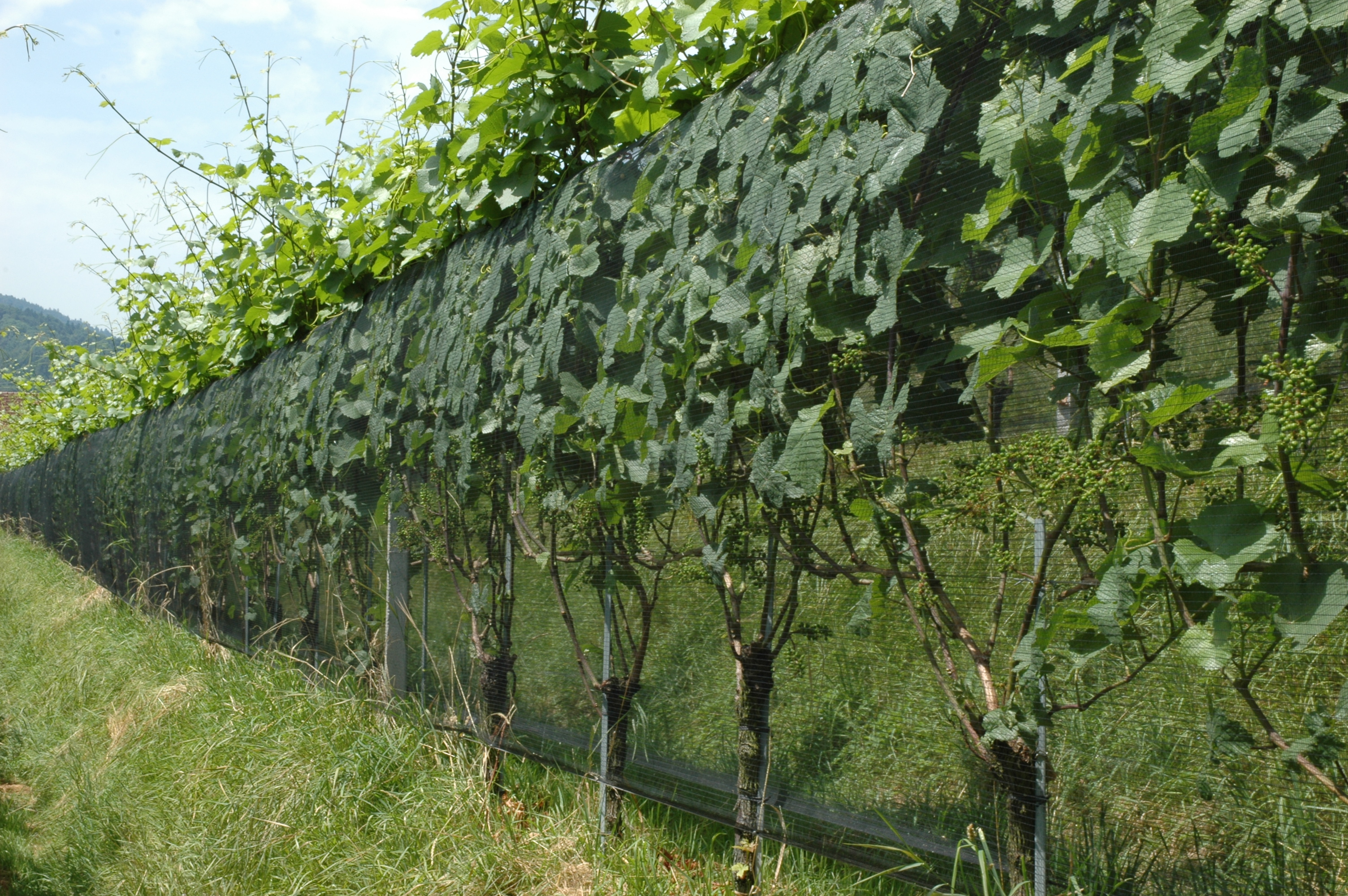 Hagel- und Vogelschutznetz für Weingarten